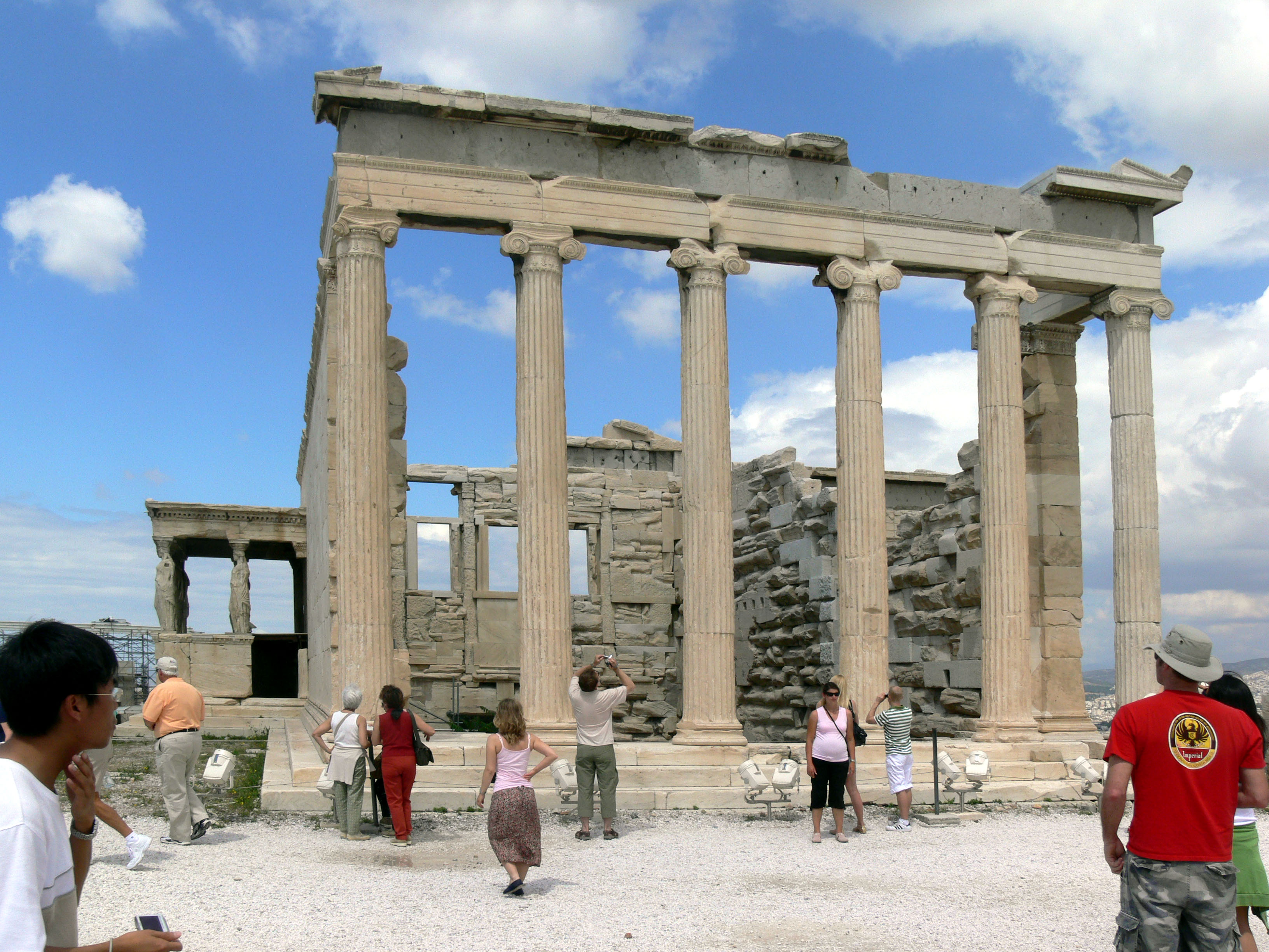 Erechtheion